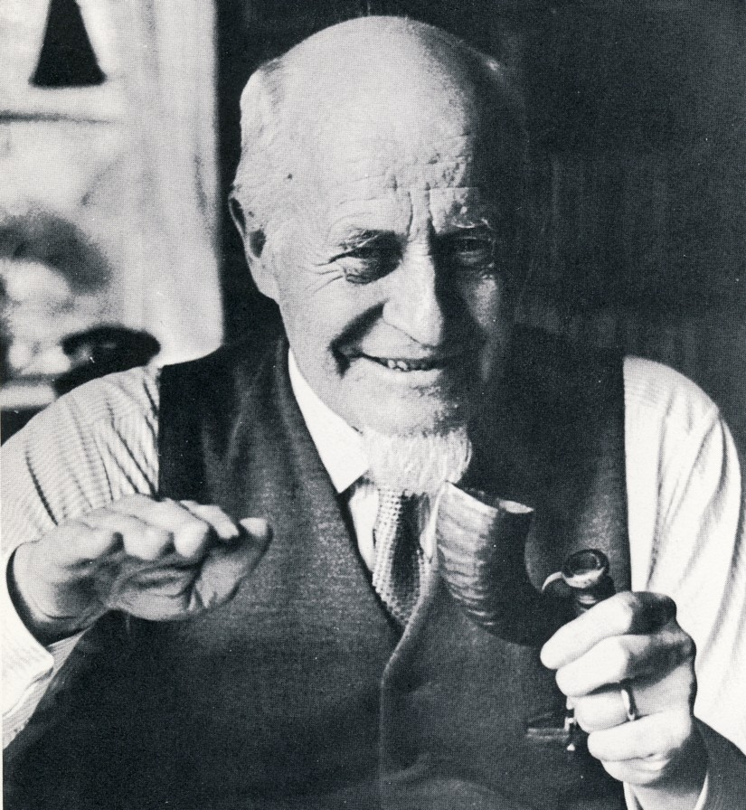 Folklivsforskaren Otto Blixt